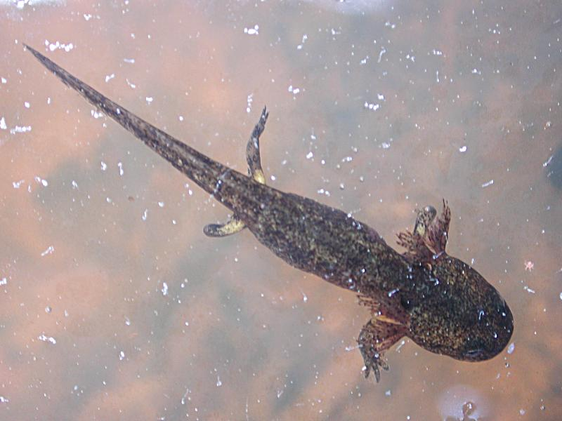 Larve de salamandre tâchetée - photo prise par André Chatroux le 18/05/2002 sur Angervilliers en Essonne 2002 André Chatroux